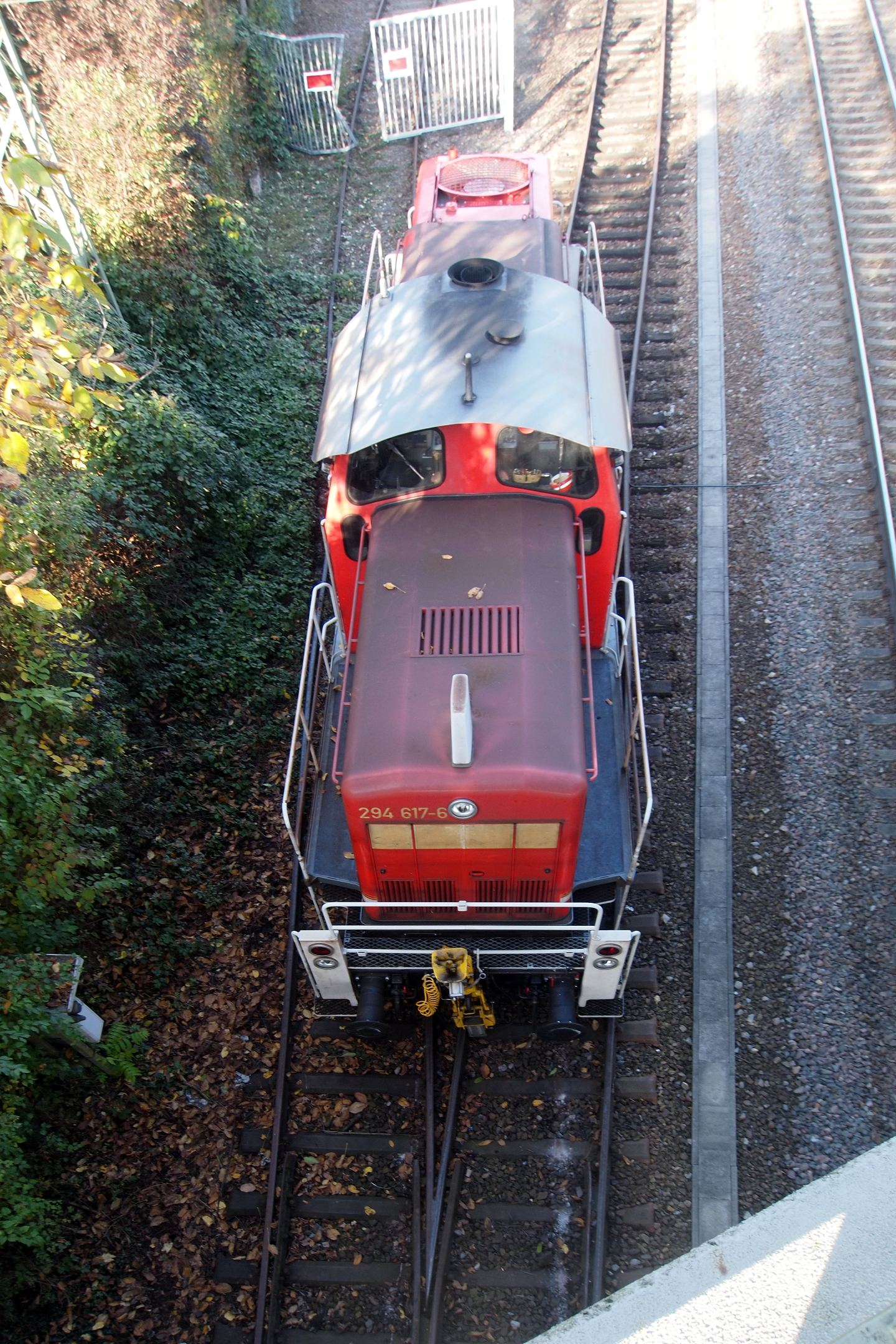 294 617-6 steht entgleist im Ausziehgleis des Gleisbauhofs Karlsruhe auf der Weiche zum Großmarkt